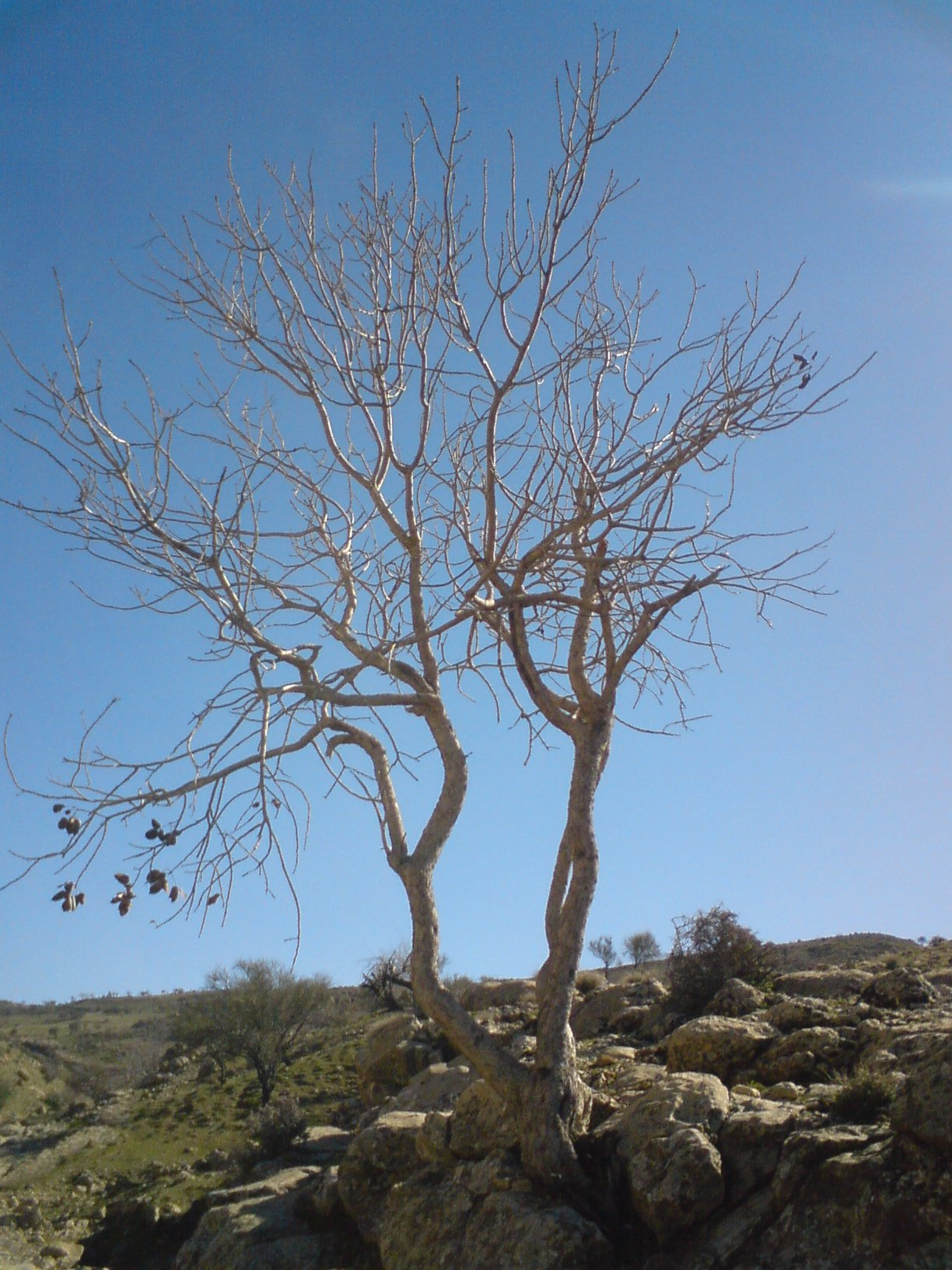 رد پای پاییز در بهار: طاهری